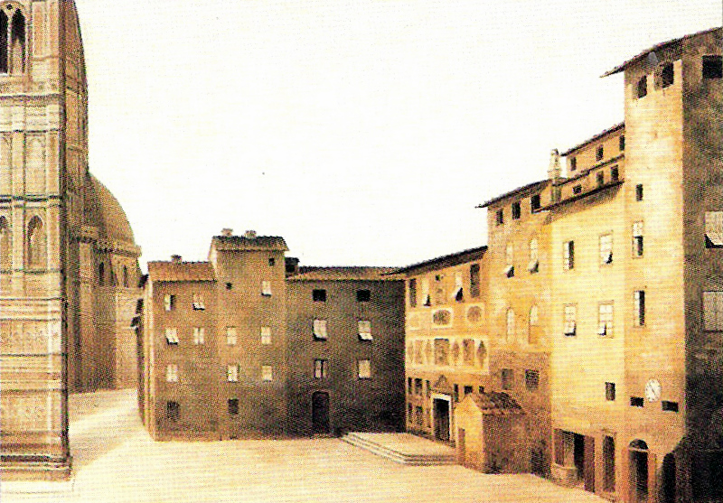 Canonica antica del Duomo e Misericordia di Firenze